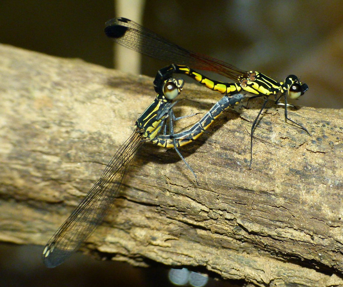 Libellago lineata male and female. Kaveri river near Dubare, India